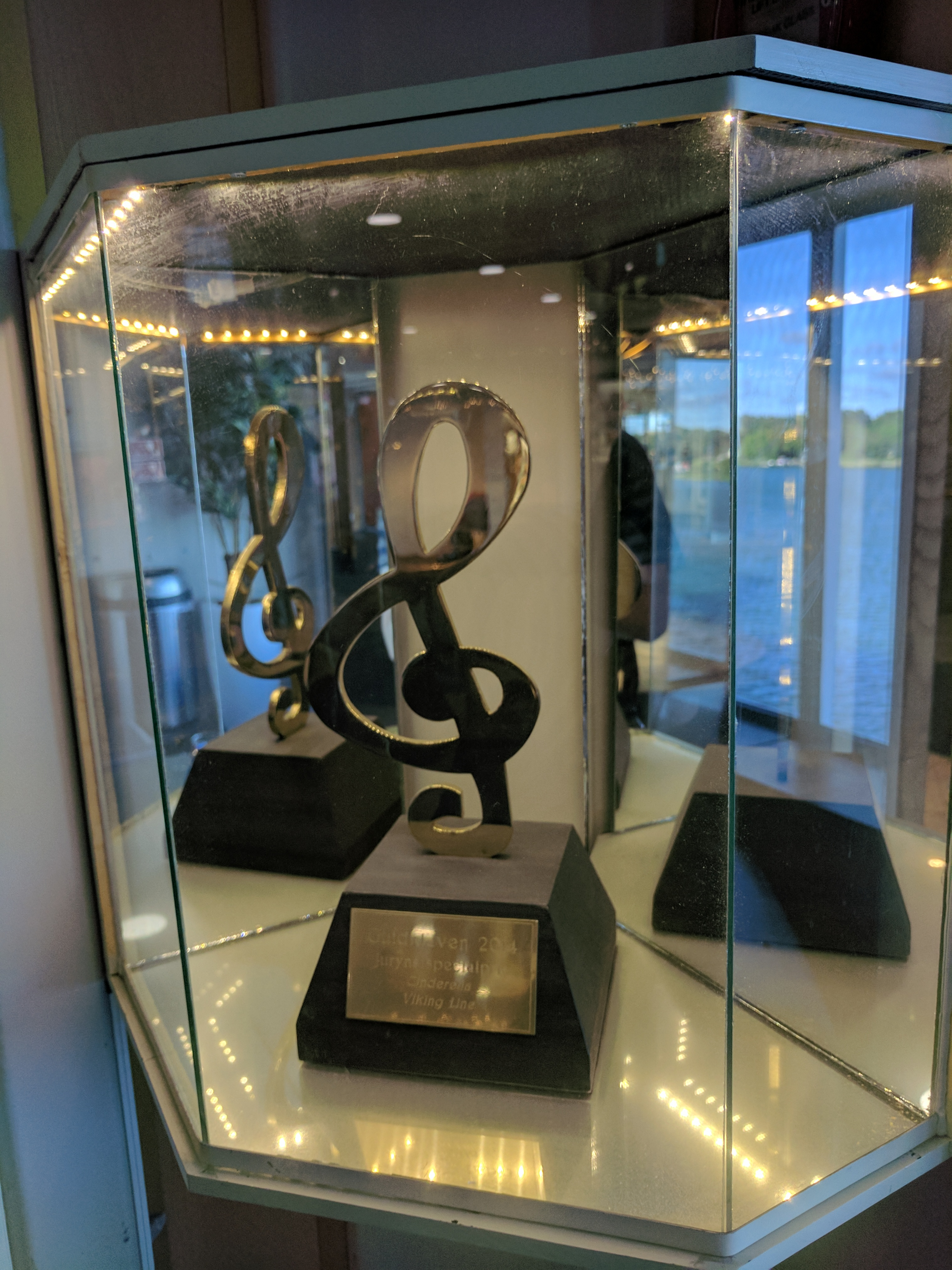 Guldklaven på M/S Cinderella